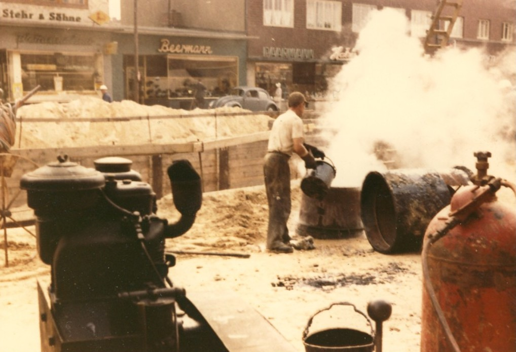 U-Bahnbau auf der Wandsbeker Marktstr. im offenen Schacht 1961-62